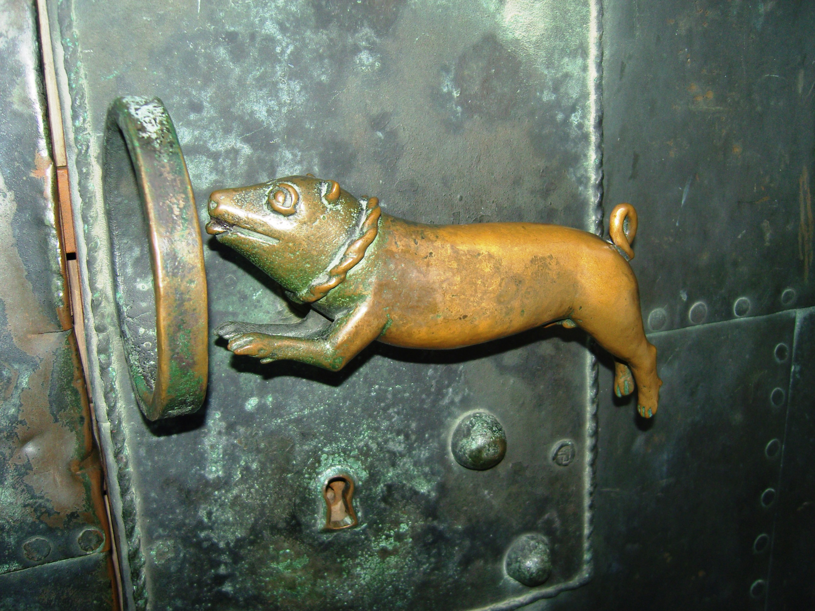 Schweinehund als Türklinke an der Tür des Quedlinburger Doms